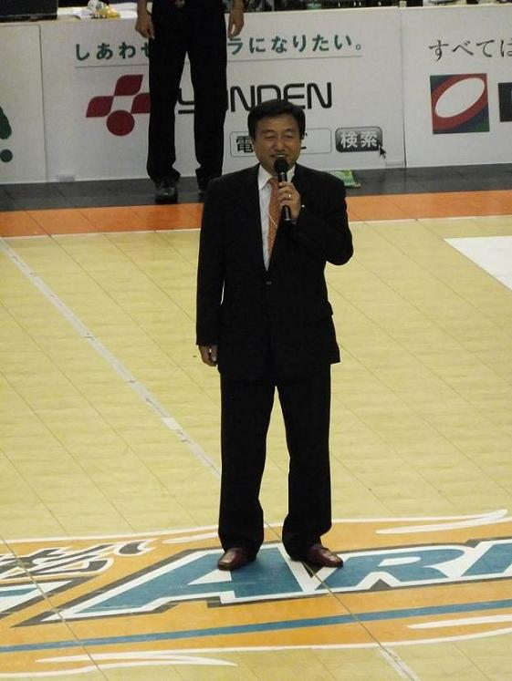 大西秀人高松市長。プロバスケ高松ファイブアローズ戦にて試合前に挨拶。